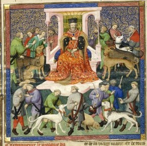 Gaston Phébus et les veneurs